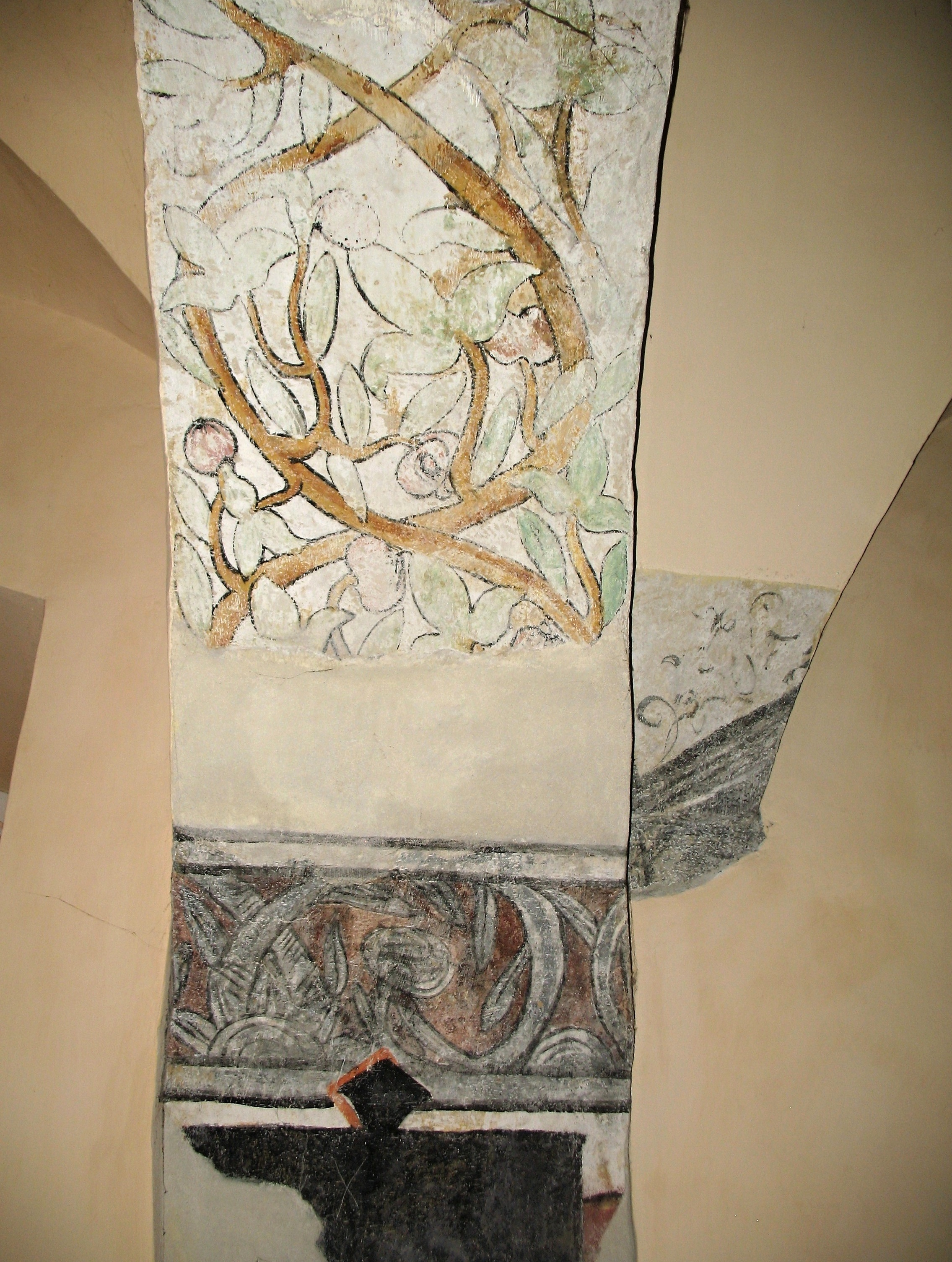 Chodba s freskami v přízemí památkově chráněného měšťanského domu čp. 125 na náměstí v Benešově nad Černou, okres Český Krumlov